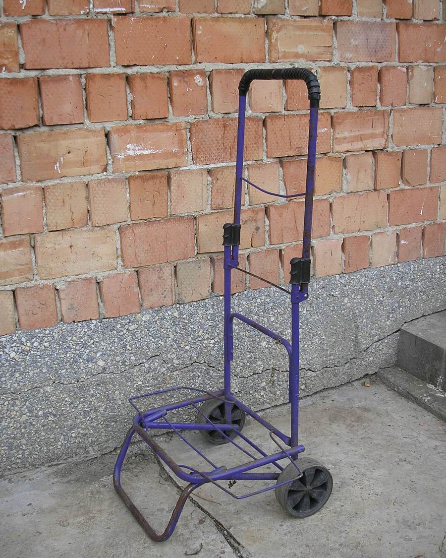 Hand trucks "Kravchuchka", Ukraine.